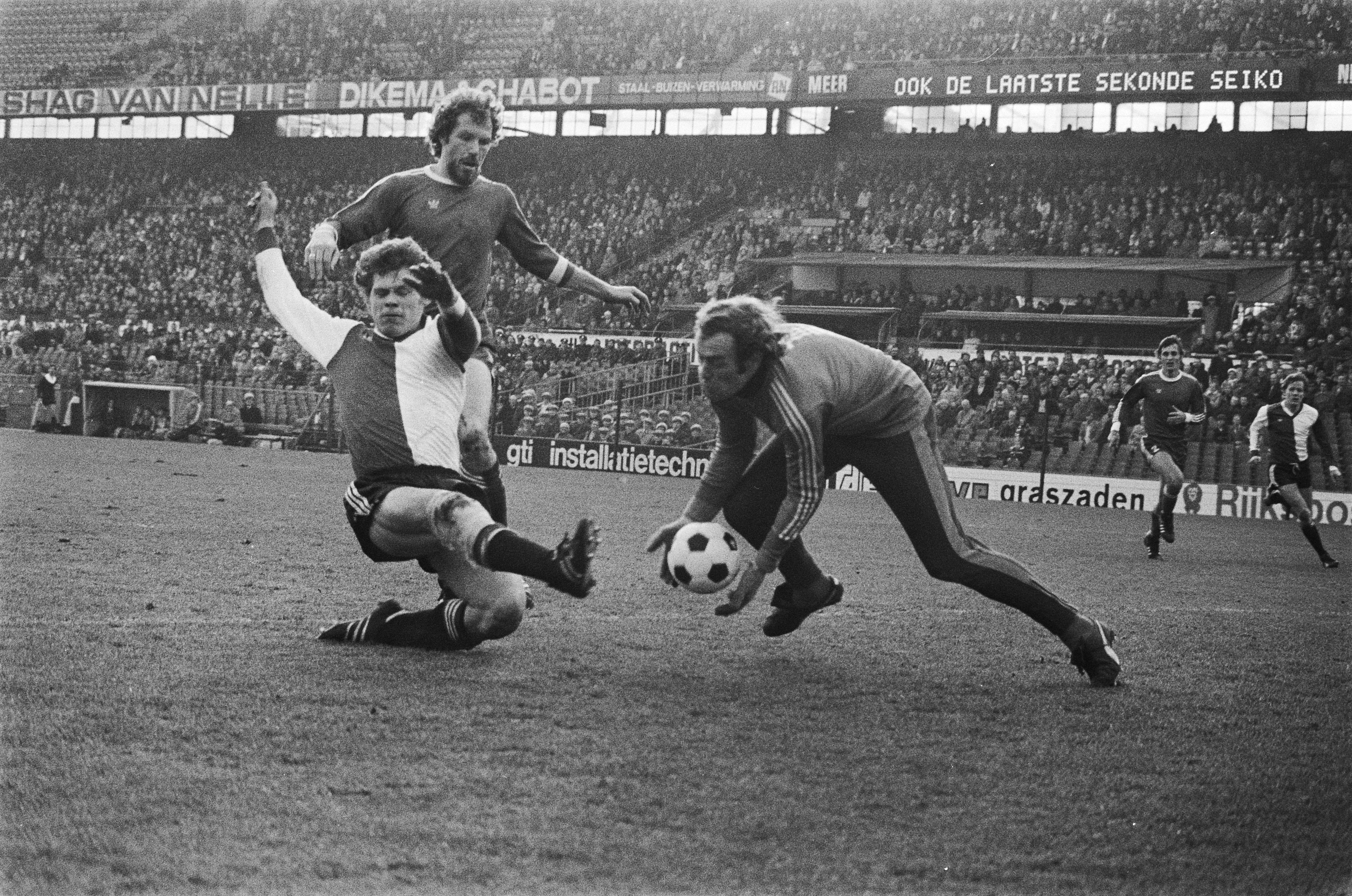 Collectie / Archief : Fotocollectie Anefo Reportage / Serie : [ onbekend ] Beschrijving : Feyenoord tegen FC Twente 0-2, Nico Jansen in duel met doelman Van Gerven Datum : 22 januari 1978 Trefwoorden : keepers, sport, voetbal Persoonsnaam : Gerven, André van, Jansen, Nico Instellingsnaam : FC Twente, Feyenoord Fotograaf : Verhoeff, Bert / Anefo Auteursrechthebbende : Nationaal Archief Materiaalsoort : Negatief (zwart/wit) Nummer archiefinventaris : bekijk toegang 2.24.01.05 Bestanddeelnummer : 929-5376